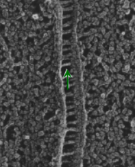 Jonction adhérente